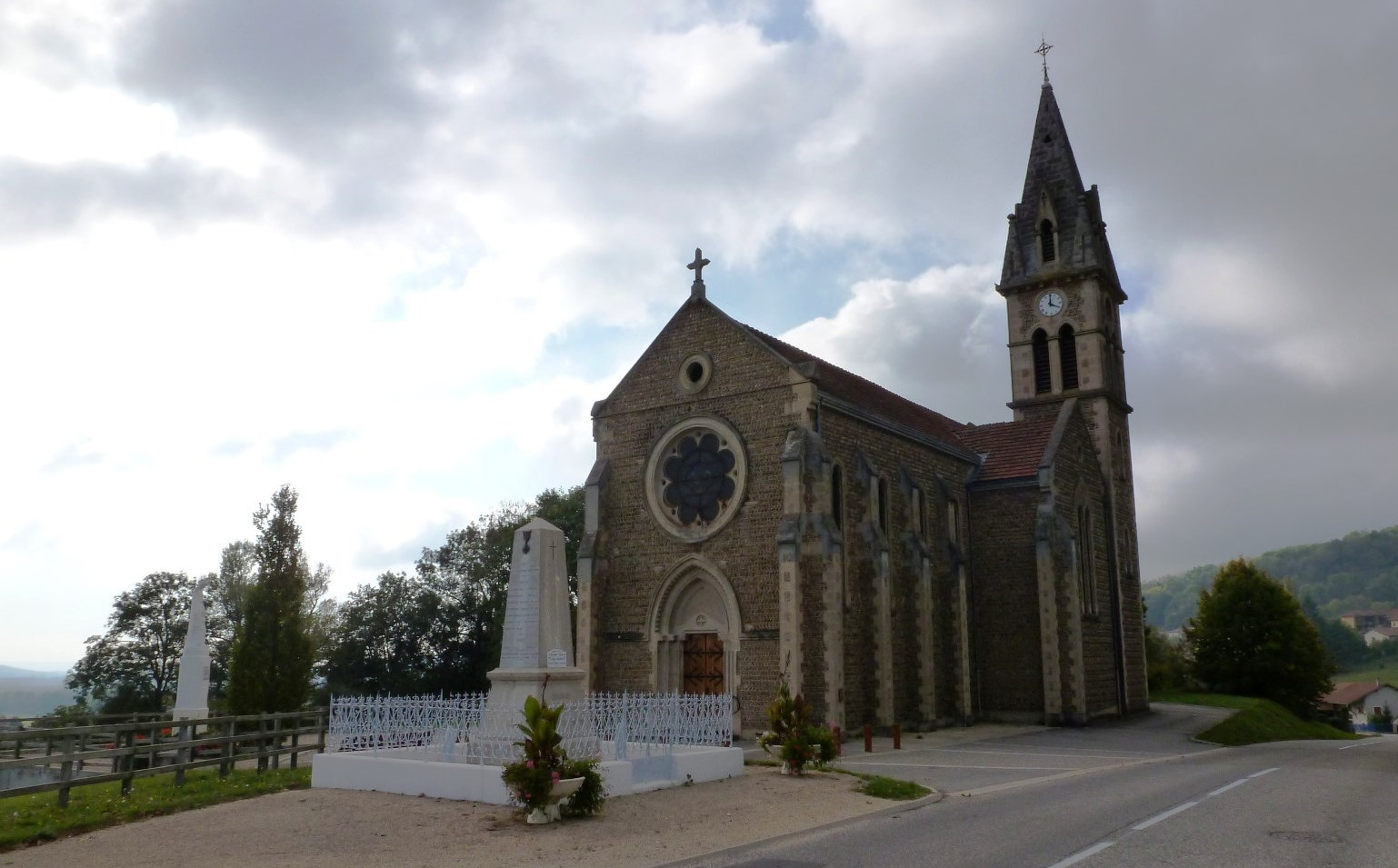 Eglise et Monuments aux Morts